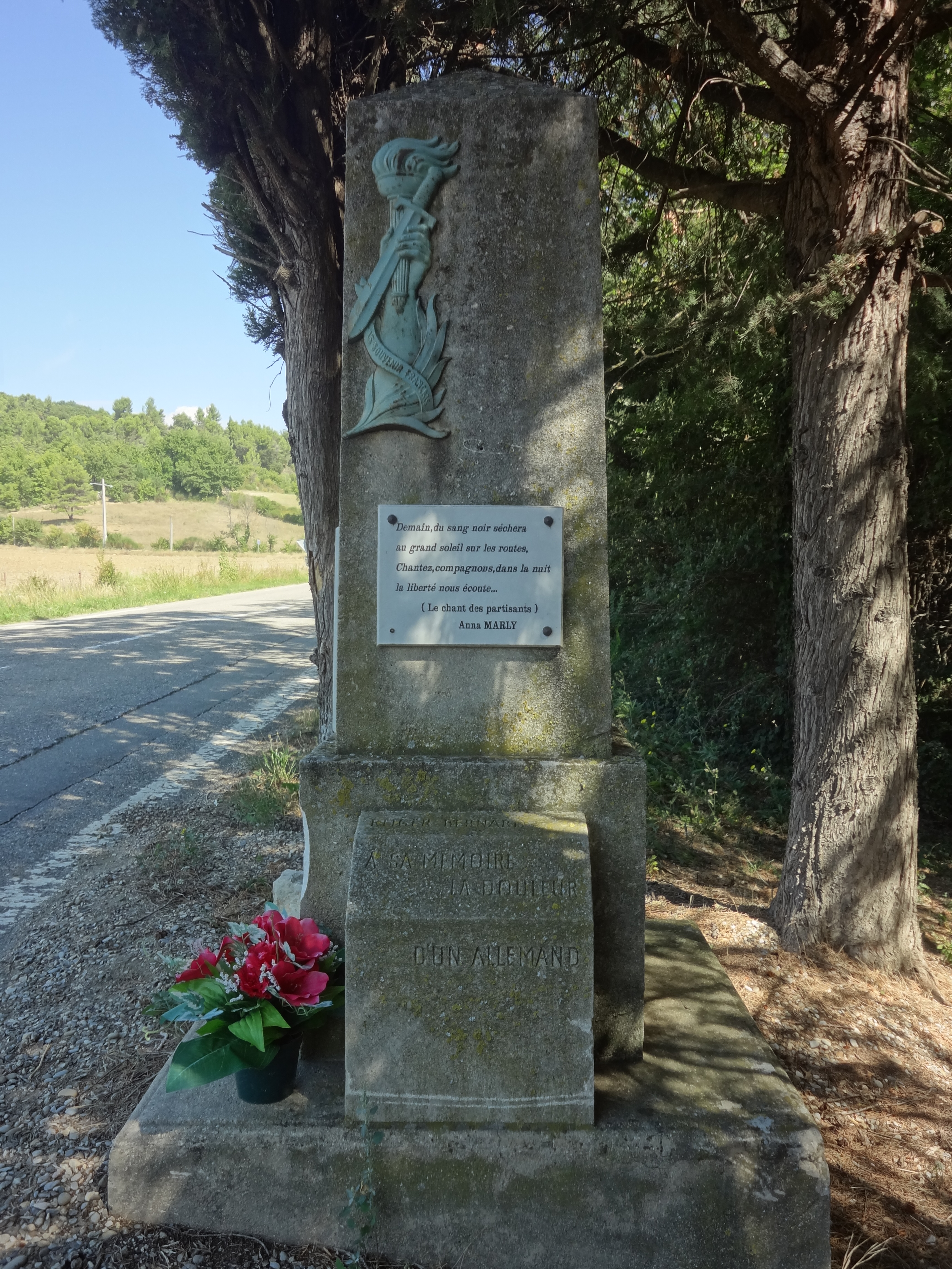 Stèle au poète résistant Roger Bernard, sur le lieu de sa mort. L'auteur allemand Curd Ochwadt a fait poser, avec l'accord des Résistants locaux, dont René Char, une petite stèle sur le côté.